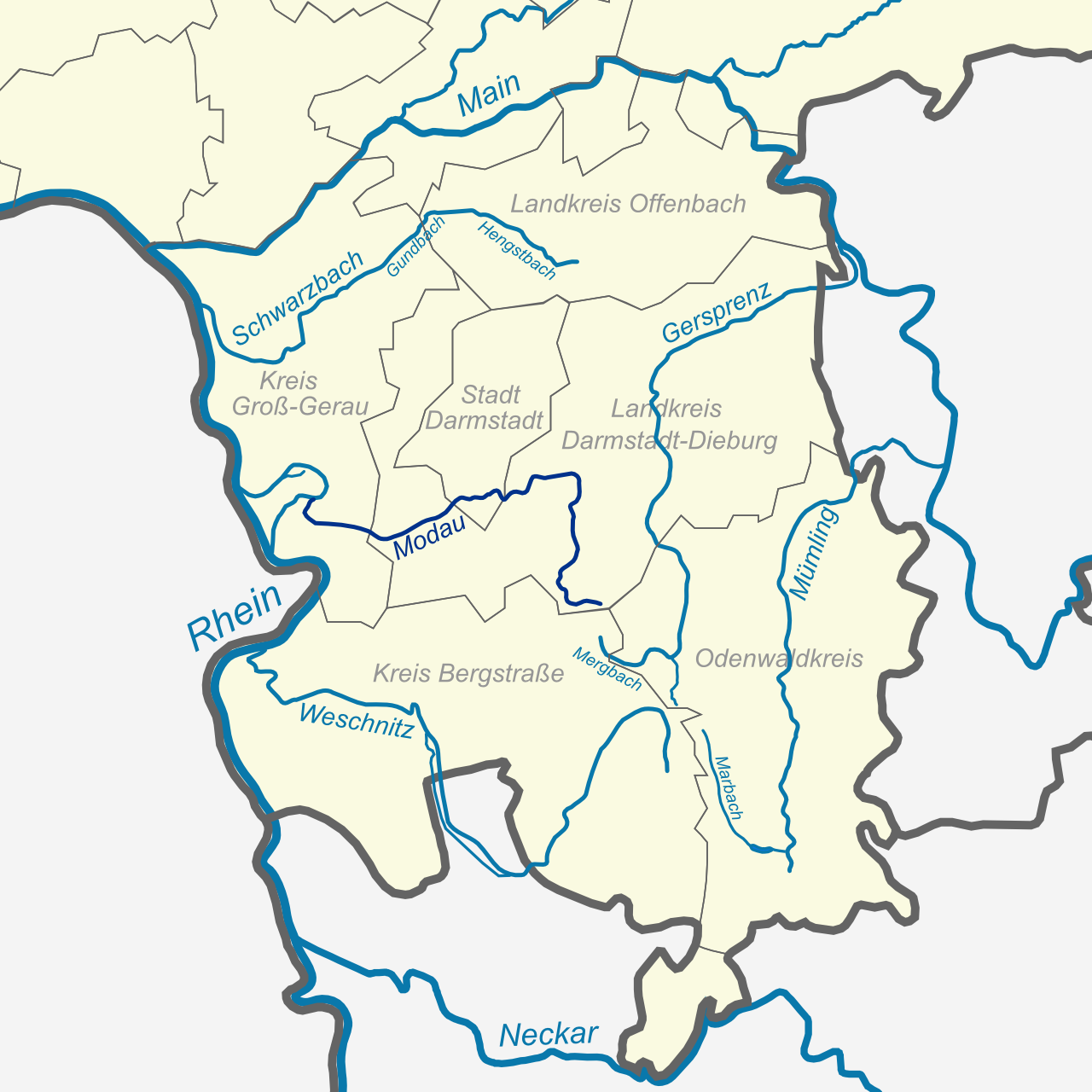 Verlaufskarte der Modau in Südhessen